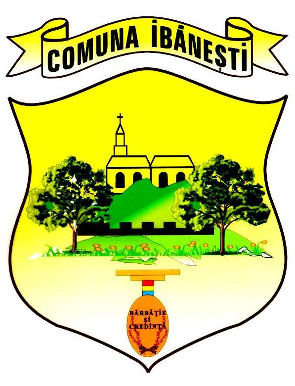 Coat of arms of Ibănești, Romania